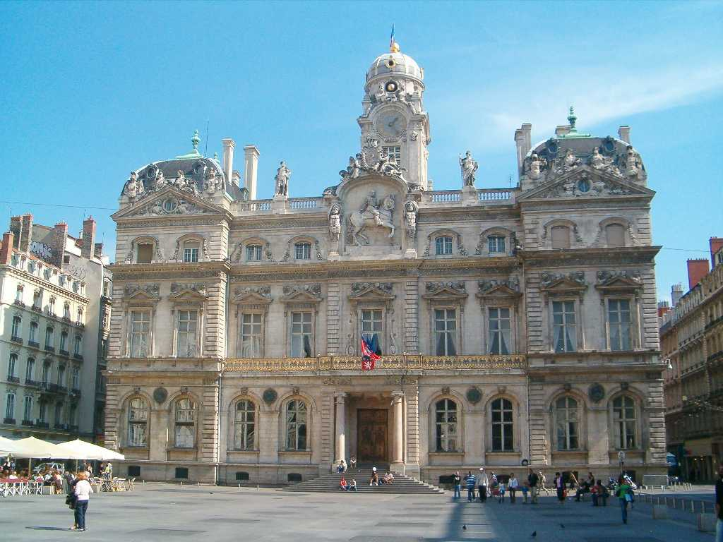 Facade de l'Hôtel de Ville de Lyon sur la Place des Terreaux